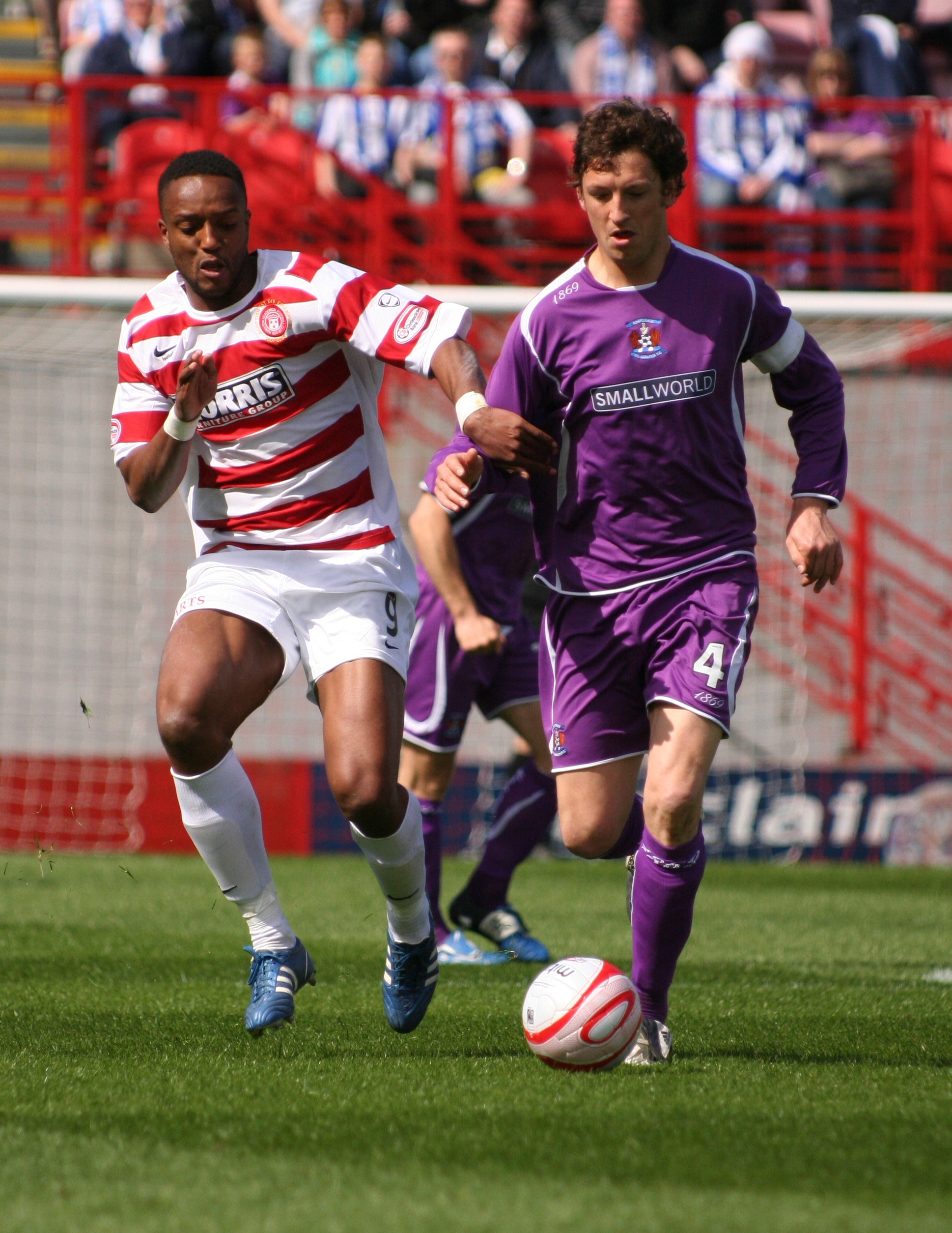 Hamilton vs Kilmarnock